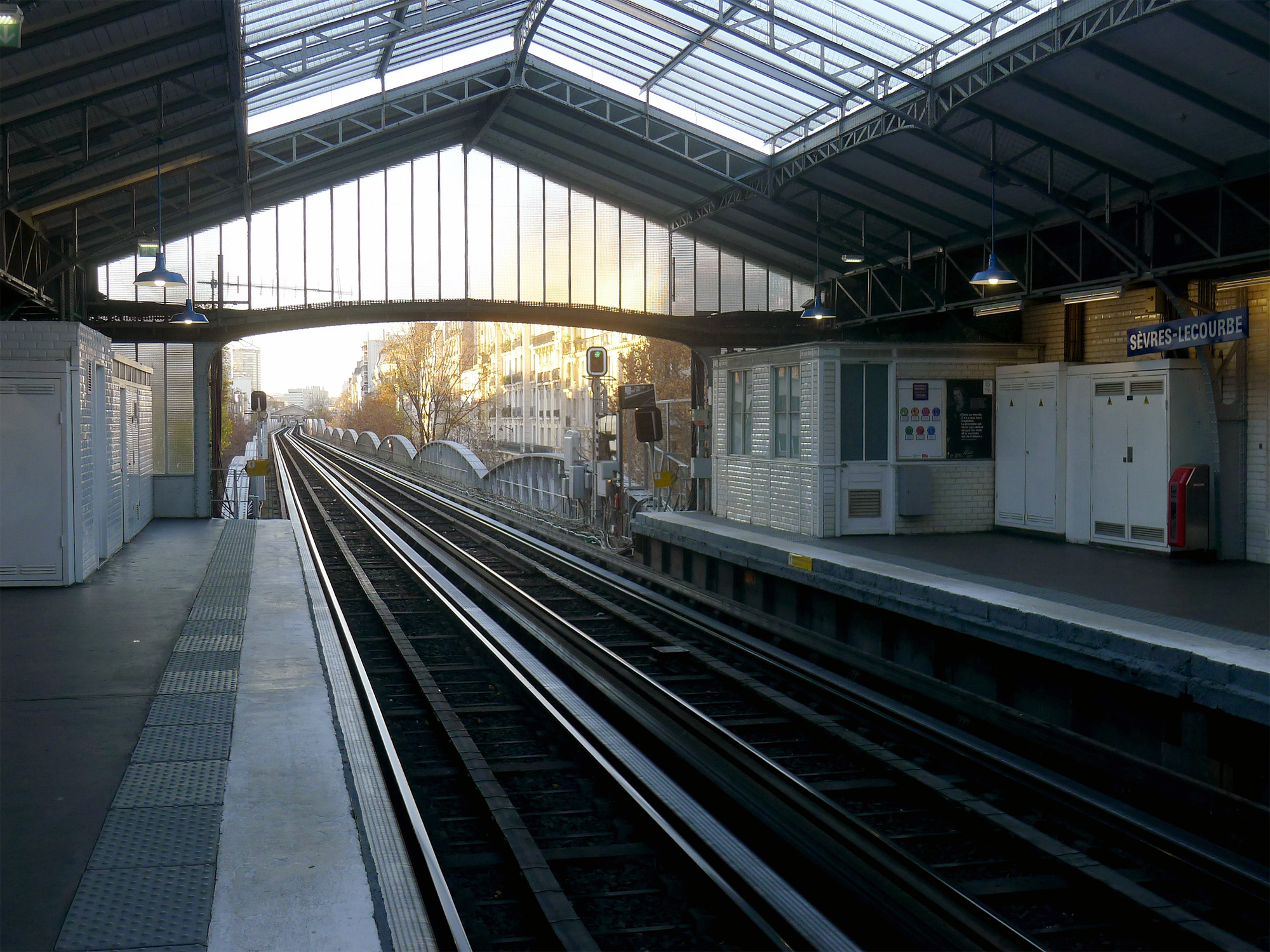 Sation de métro Sèvres-Lecourbes (intérieur de la station)